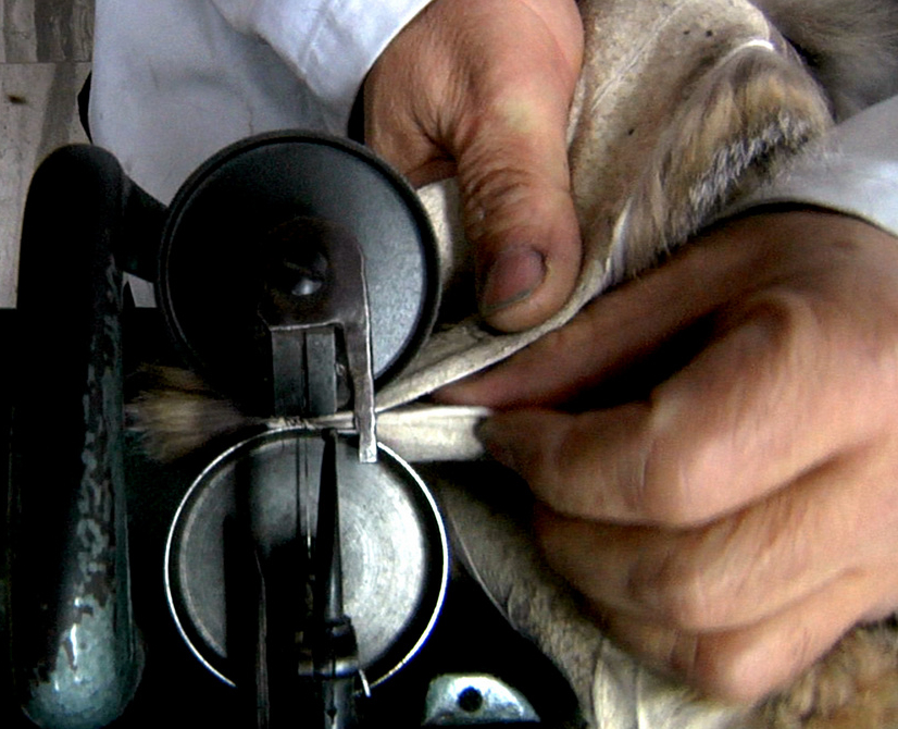 Griechischer Pelznäher an einer Pelznähmaschine mit Nahthöhenbegrenzer.